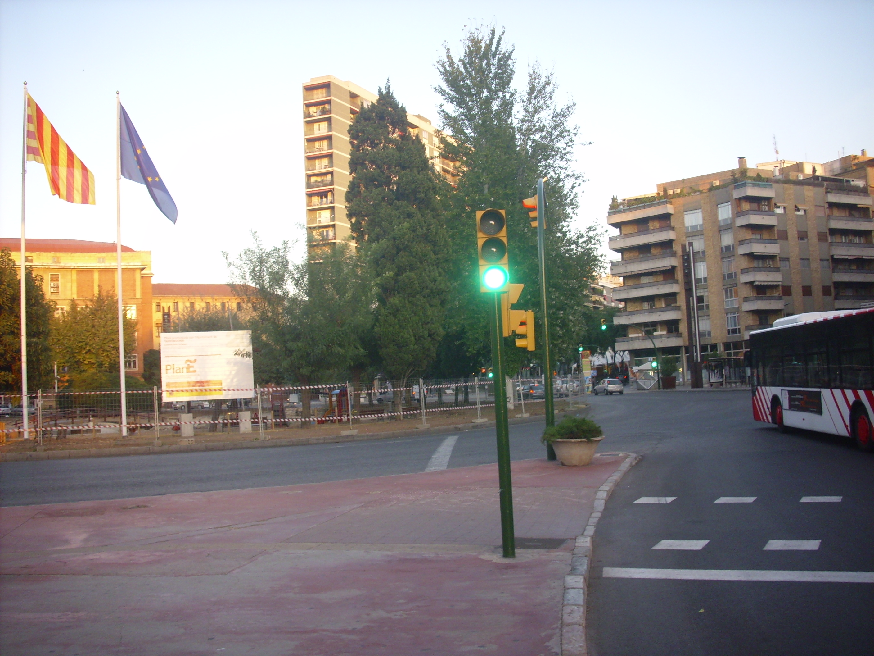 Vista parcial de la Plaça Imperial Tarraco des de la cruïlla del l'Avinguda de Roma.